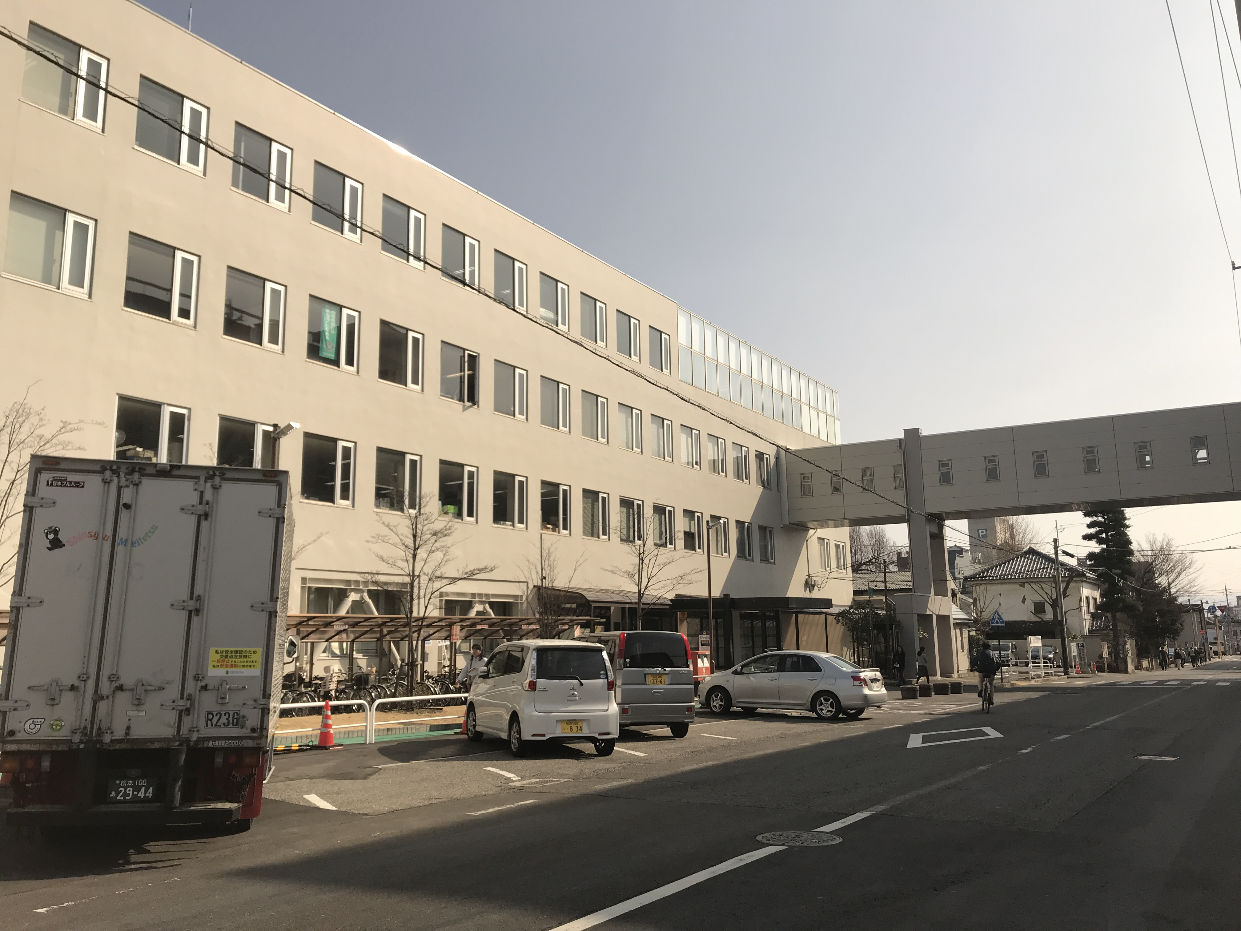 松本市役所東庁舎